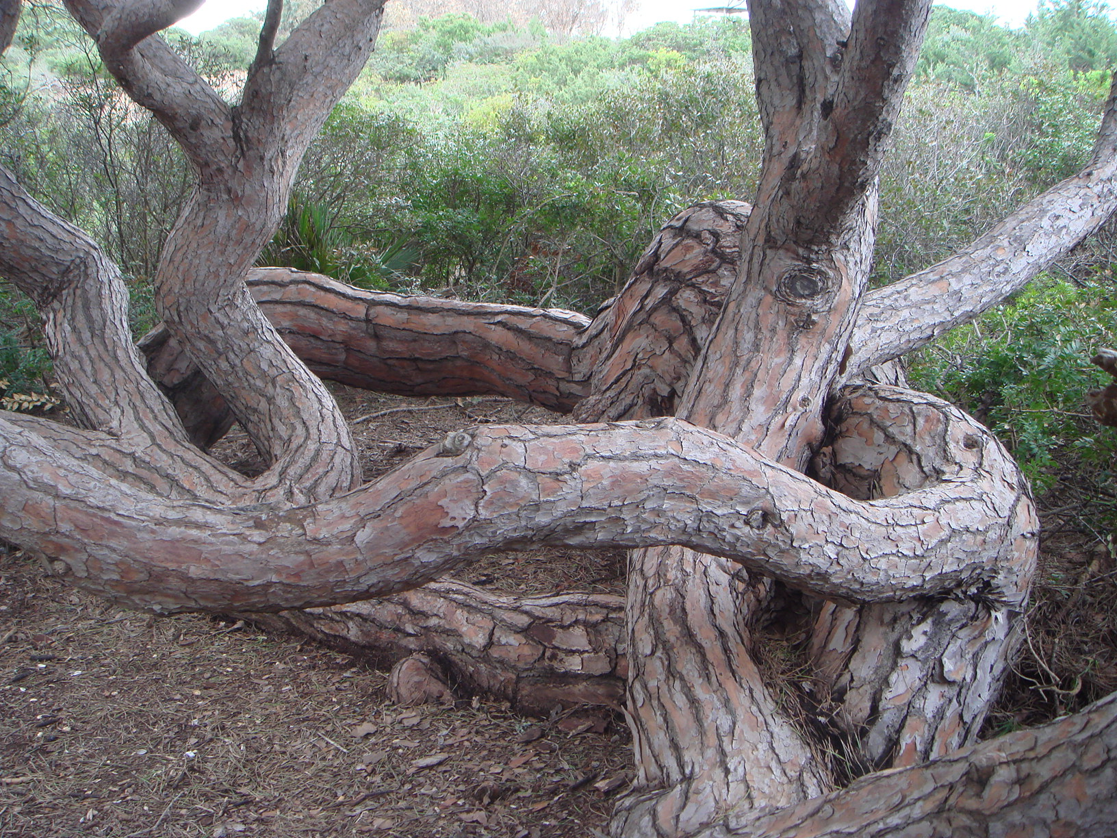 Pinus pinea, Efectos del viento de poniente en un tronco de pino piñonero. Pinar de La Barrosa, Chiclana, (Cádiz), España.